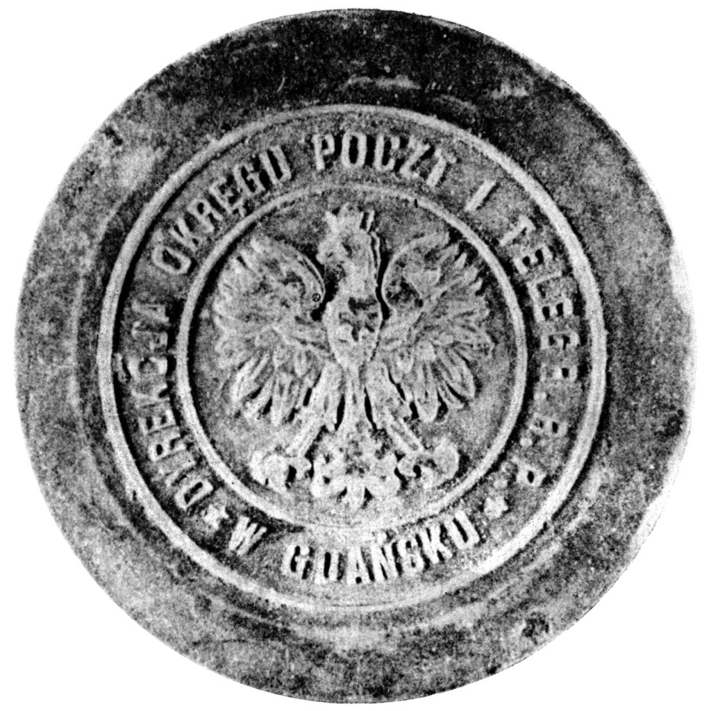 Pieczec Dyrekcji Okregu Poczt i Telegramow w Gdansku